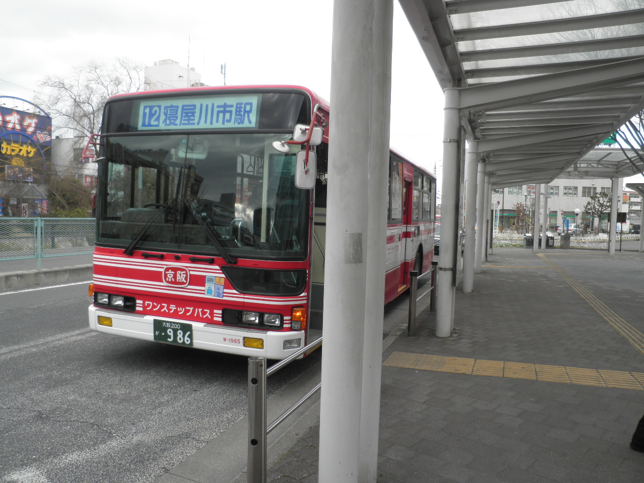 茨木寝屋川線のバス